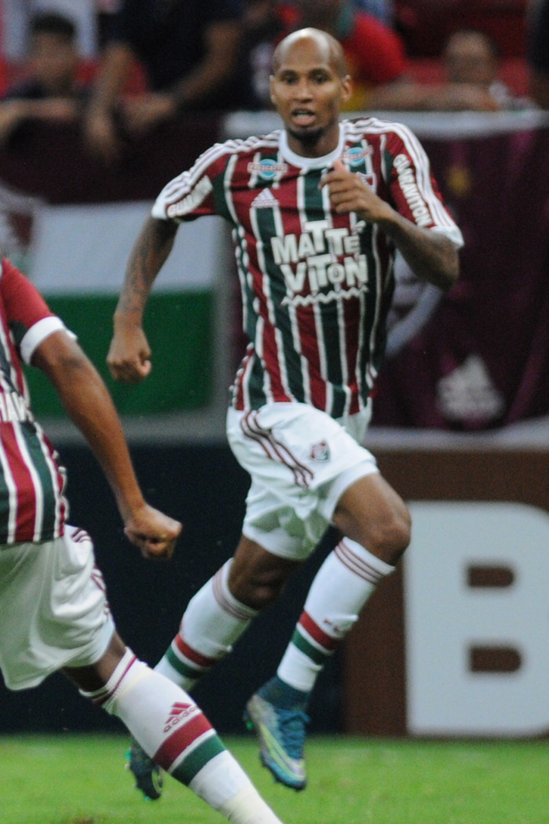 Estádio Mané Garrincha, Brasília, DF, Brasil 21/2/2016 Foto: Andre Borges/Agência Brasília Fluminense e Flamengo jogam neste domingo (21) pela quinta rodada do Campeonato Carioca no Estádio Mané Garrincha. A partida terminou com vitória do Flamengo sobre o Fluminense por 2 a 1.